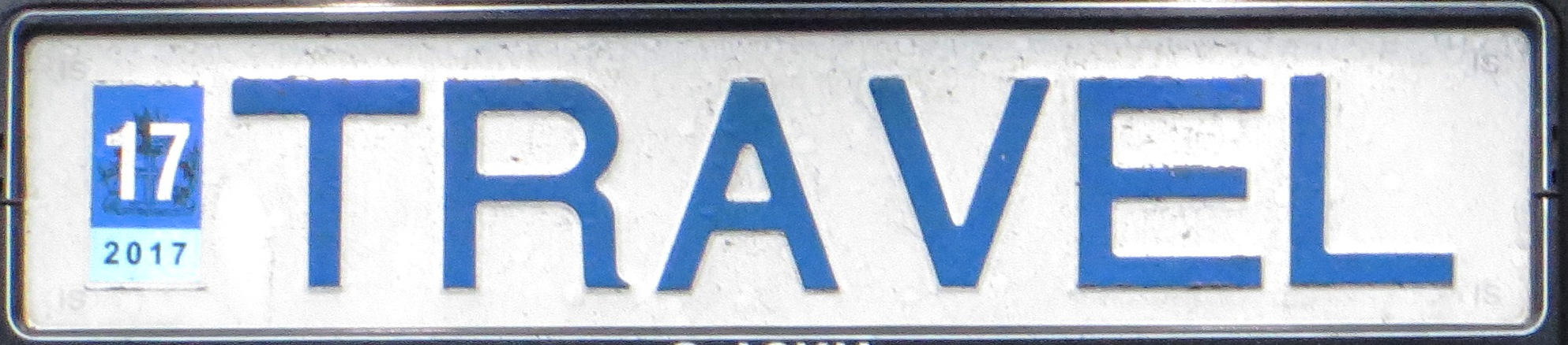 IJSLAND kentekenplaat